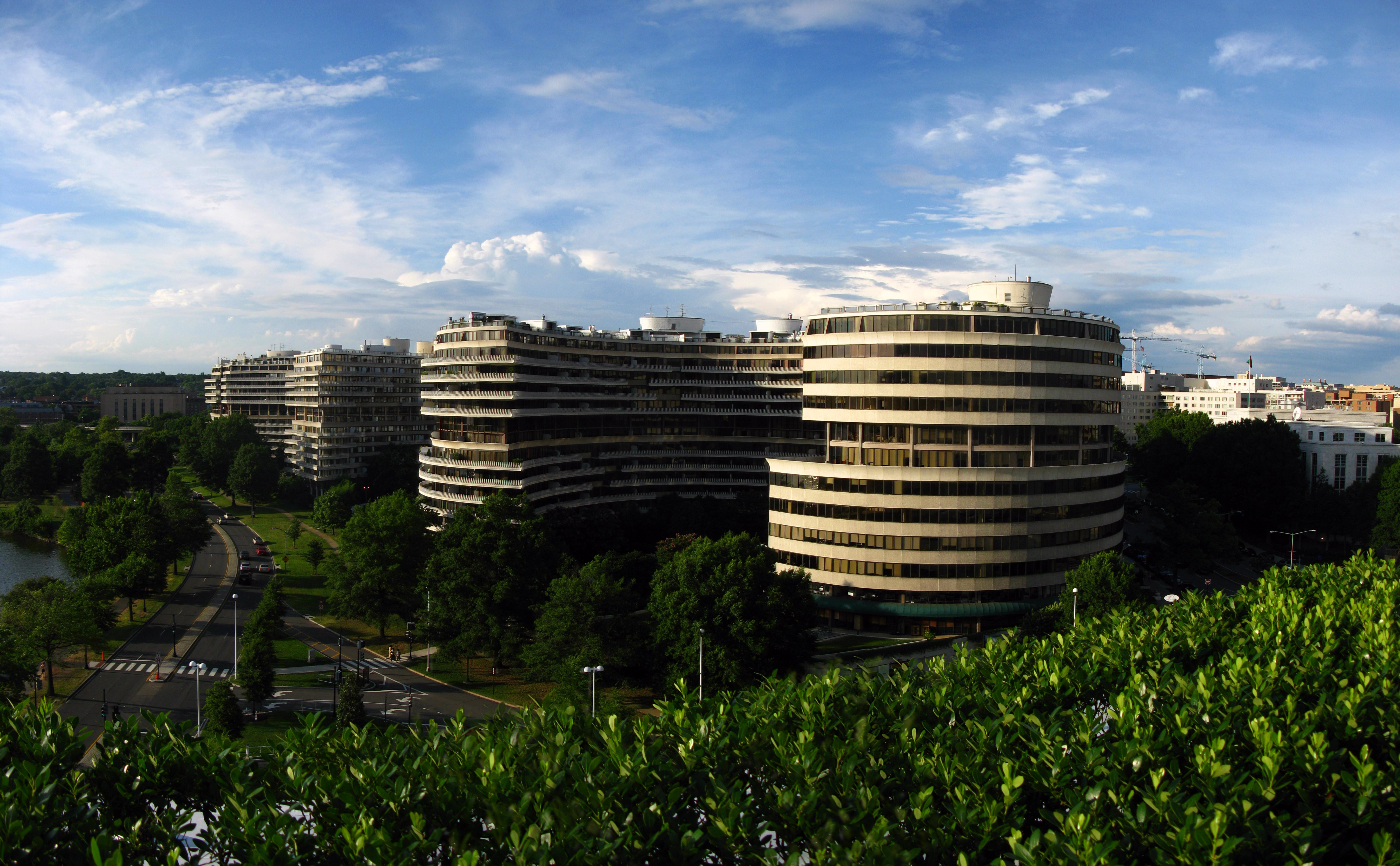 Hotelový komplex Watergate ve Washingtonu DC, USA